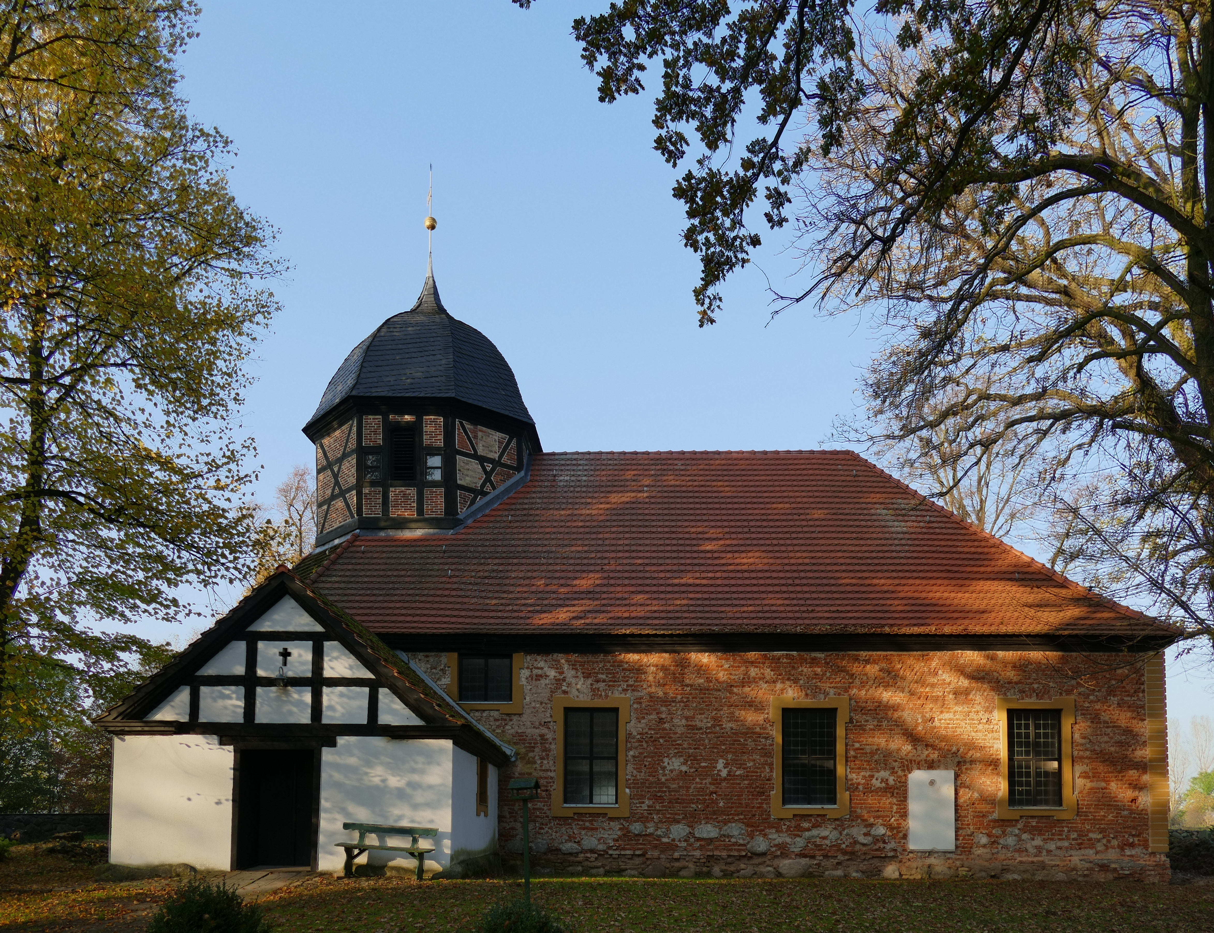 Dreifaltigkeitskirche auf dem Scharmützel bei Ferdinandshof, Ansicht von Süden